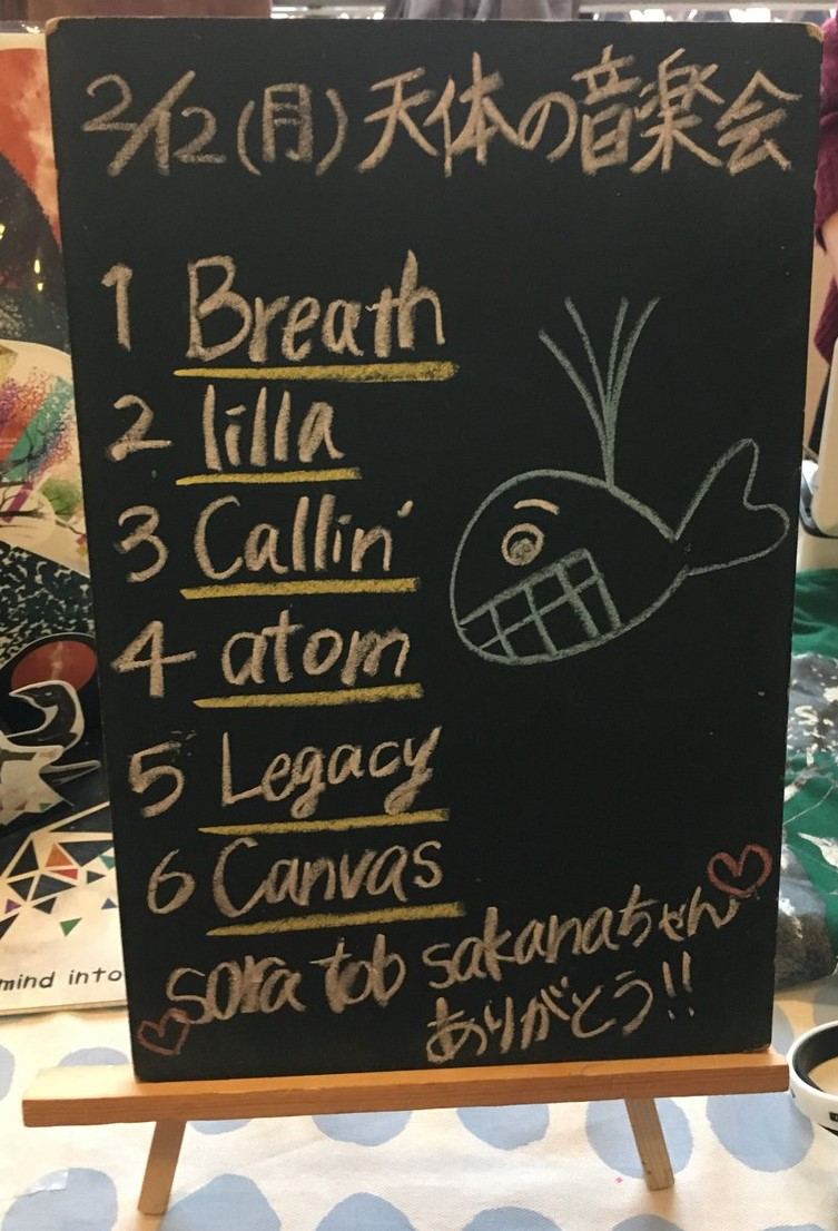 amiinAセトリボード(20180212(1))